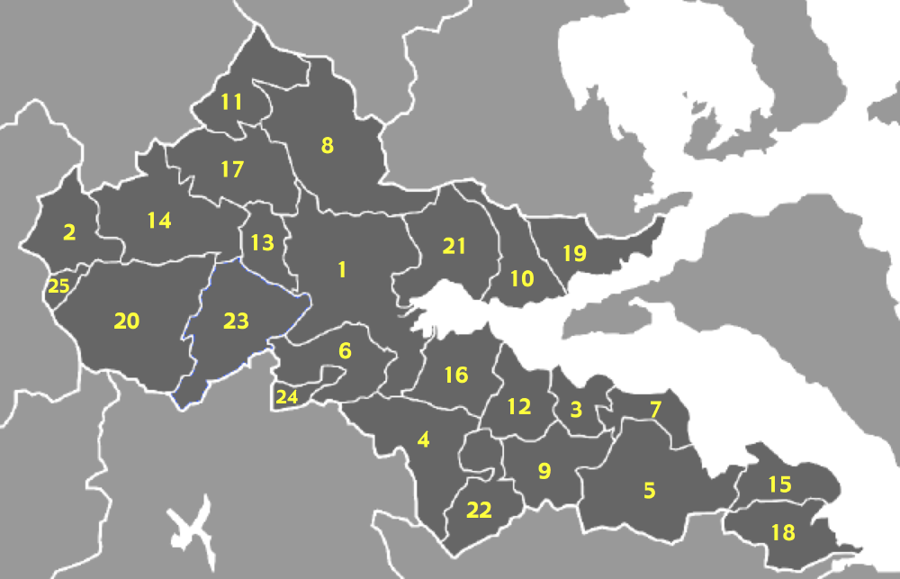 Map of Fthiotida prefecture (Greece) with administrative divisions (municipalities and communities) numbered in alphabetical order (in greek). Legend: 1 -- Δήμος Λαμιέων -- Lamia 2 -- Δήμος Αγίου Γεωργίου Τυμφρηστού -- Agios Georgios Tymphrastos 3 -- Δήμος Αγίου Κωνσταντίνου -- Agios Konstantinos 4 -- Δήμος Αμφίκλειας -- Amfiklia 5 -- Δήμος Αταλάντης -- Atalanti 6 -- Δήμος Γοργοπόταμου -- Gorgopotamos 7 -- Δήμος Δαφνουσίων -- Daphnousia 8 -- Δήμος Δομοκού -- Domokos 9 -- Δήμος Ελάτειας -- Elatia 10 -- Δήμος Εχιναίων -- Echinei 11 -- Δήμος Θεσσαλιώτιδας -- Thessaliotida 12 -- Δήμος Καμένων Βούρλων -- Kamena Vourla 13 -- Δήμος Λειανοκλαδίου -- Lianokladi(on) 14 -- Δήμος Μακρακώμης -- Makrakomi 15 -- Δήμος Μαλεσίνας -- Malesina 16 -- Δήμος Μώλου -- Molos 17 -- Δήμος Ξυνιάδας -- Xynias 18 -- Δήμος Οπουντίων -- Opuntia 19 -- Δήμος Πελασγίας -- Pelasgia 20 -- Δήμος Σπερχειάδας -- Sperchias 21 -- Δήμος Στυλίδας -- Stylis 22 -- Δήμος Τιθορέας -- Tithorea 23 -- Δήμος Υπάτης -- Ypati 24 -- Κοινότητα Παύλιανης -- Pavliani 25 -- Κοινότητα Τυμφρηστού -- Tymphrastos